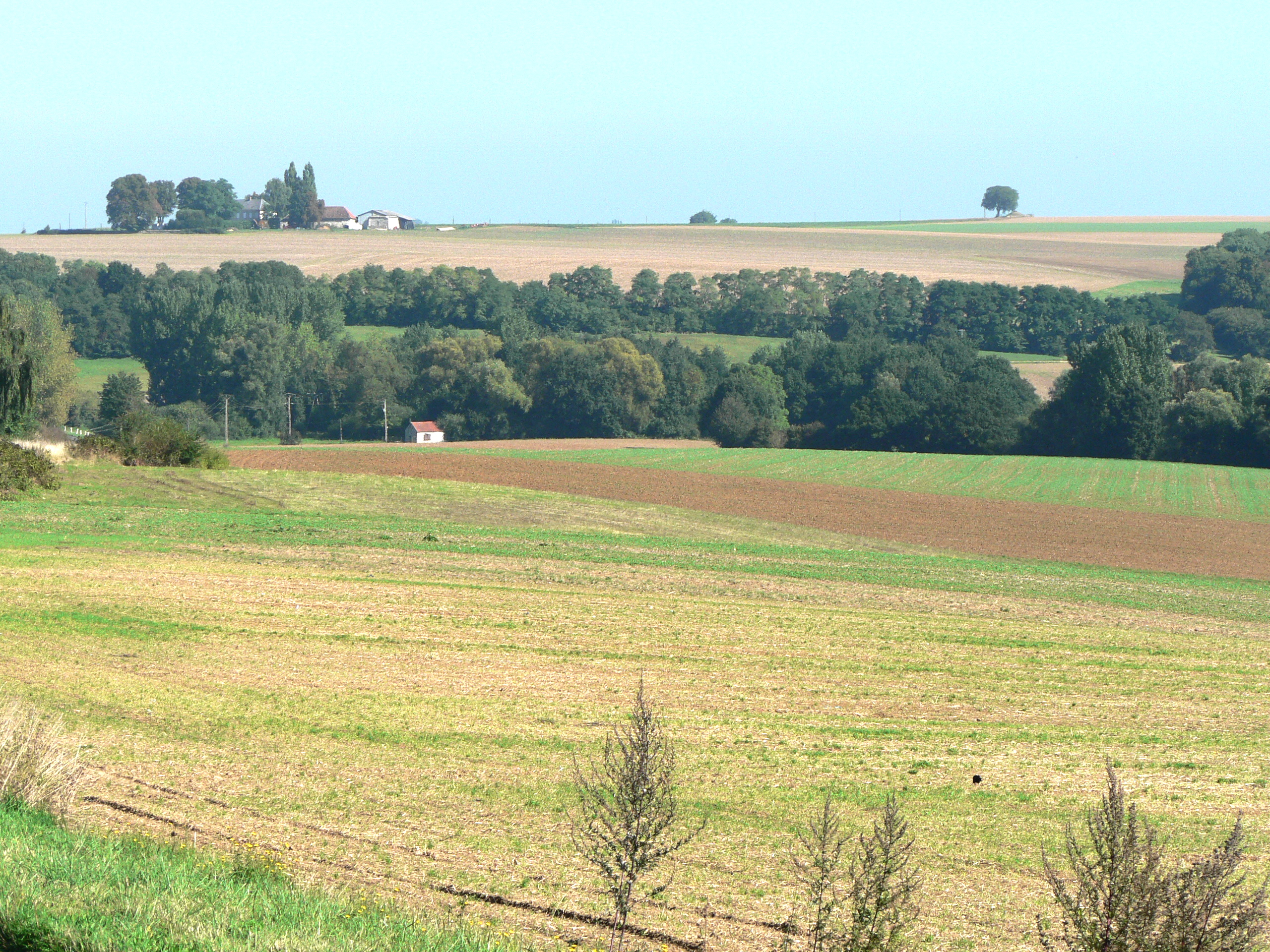 Plateau du Multien, vallée boisée de la Thérouanne et ferme de Champfleury à l'horizon